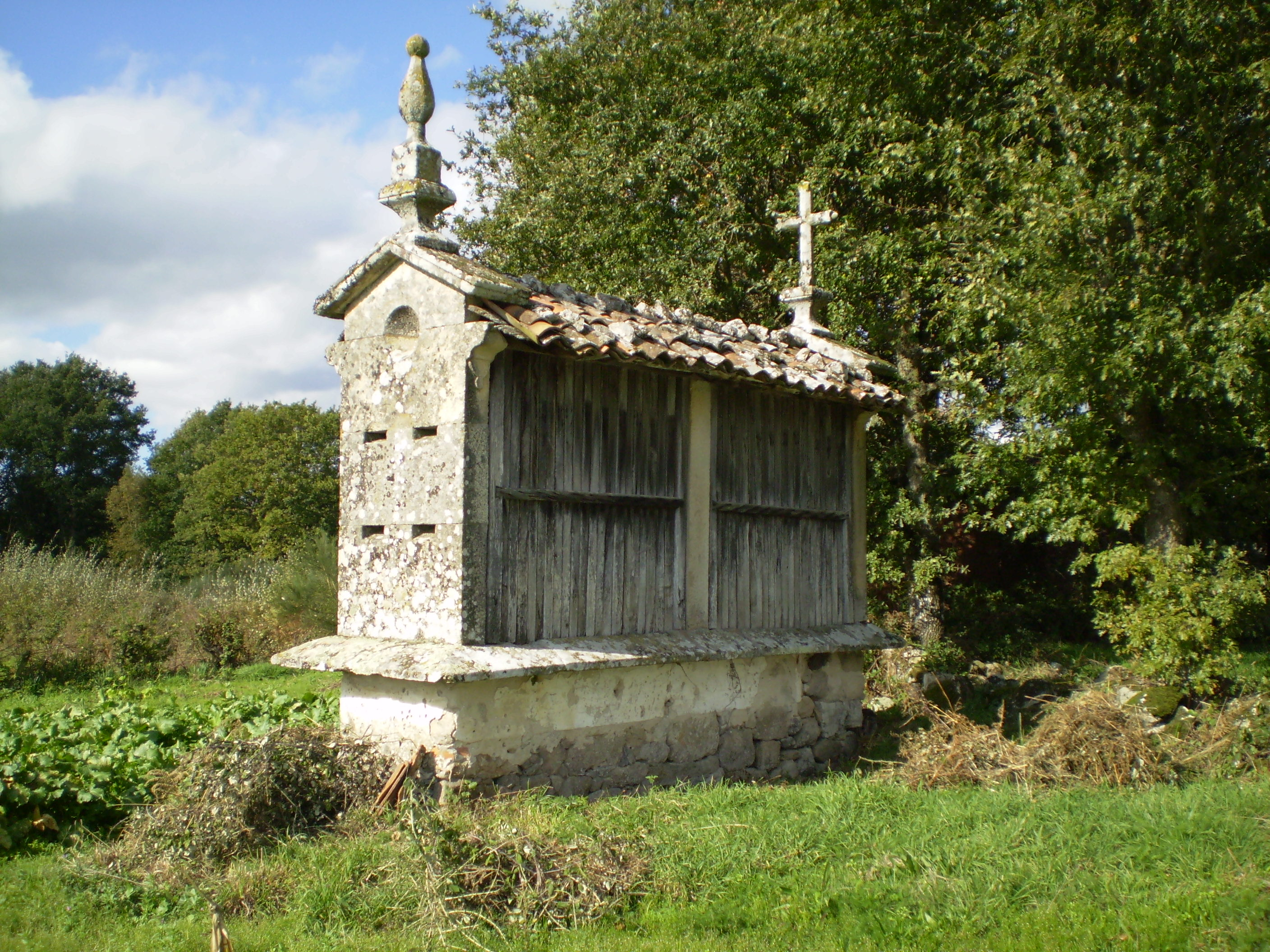 Hórreo en Dorra (Antas de Ulla)